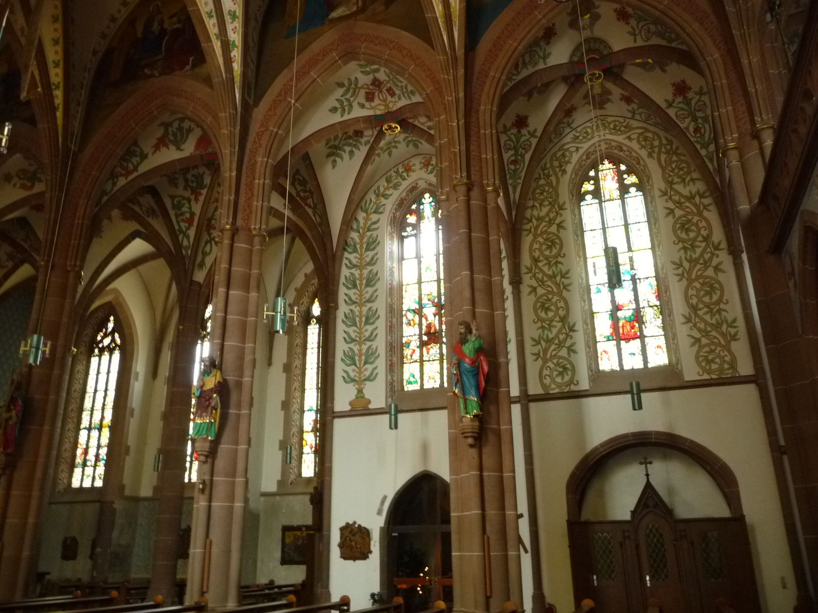 katholische Kirche St. Aposteln in Viernheim, im Kreis Bergstraße (Hessen)